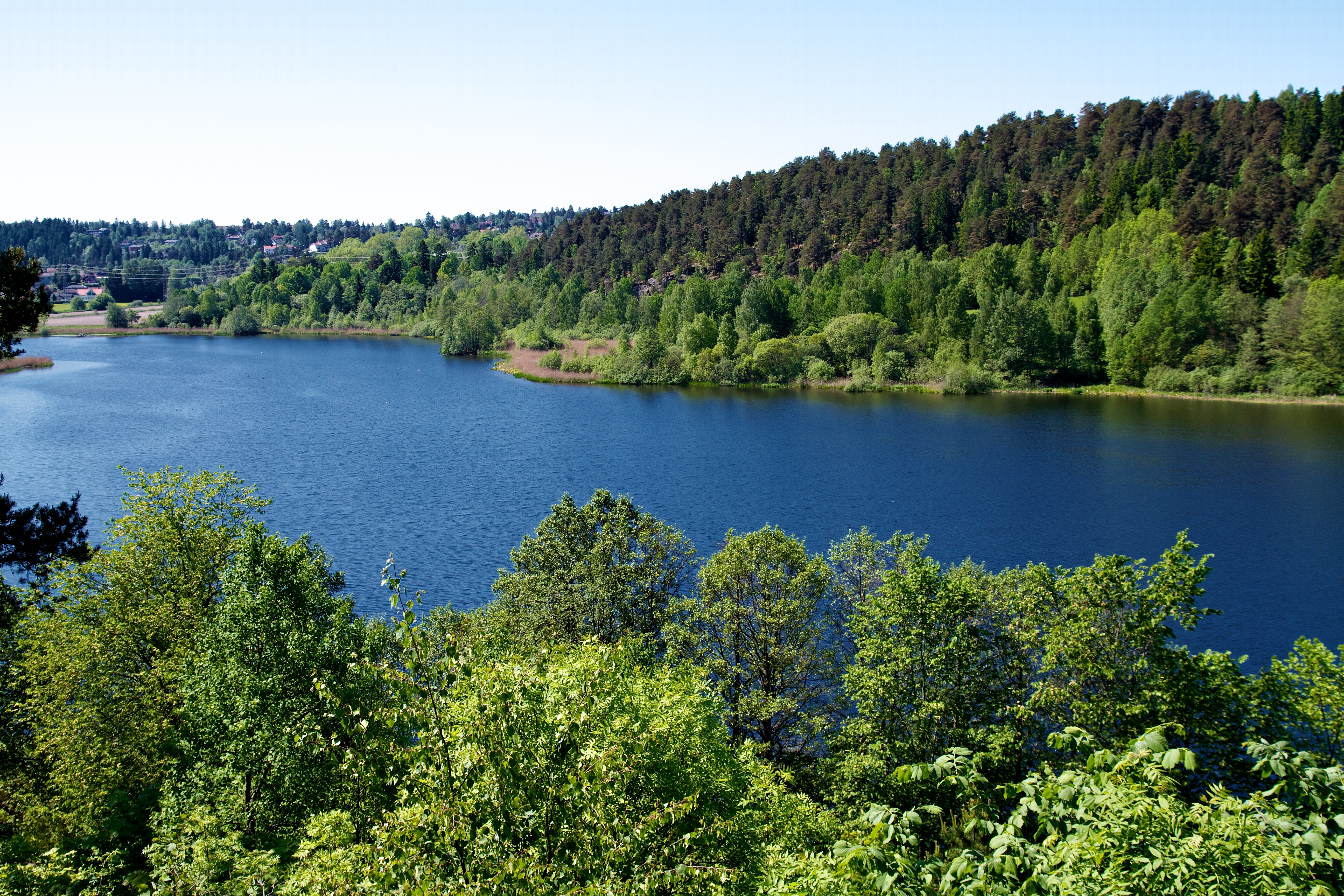 Østensjøvannet sett fra Oppsal terrasse